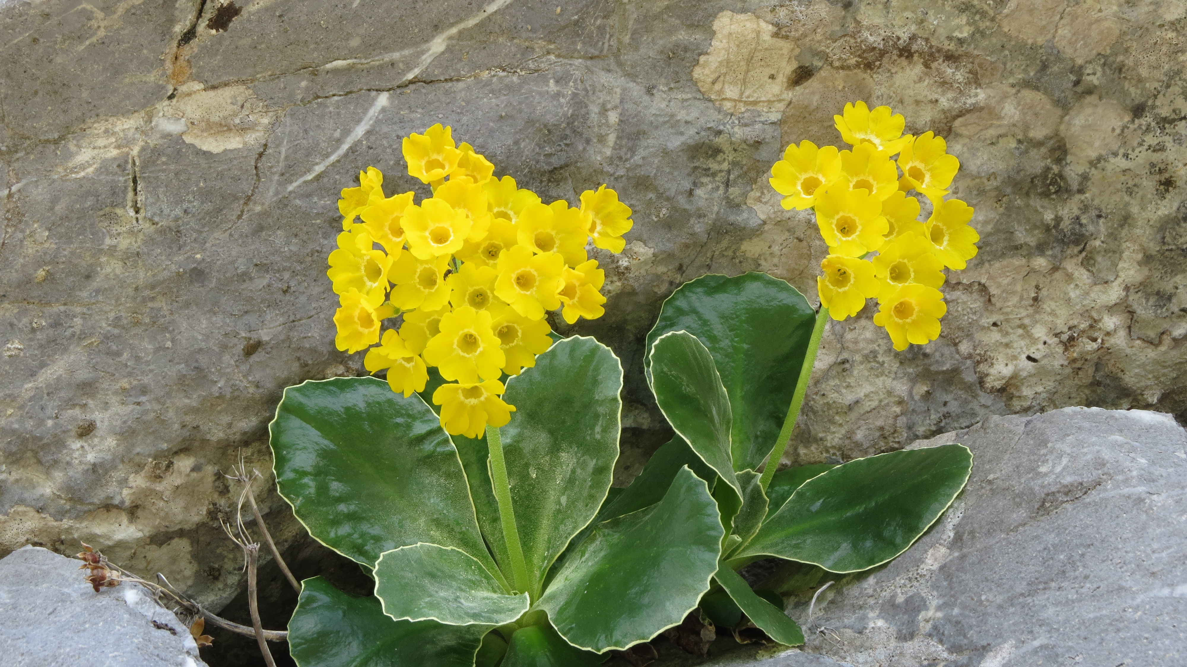 Primula auricula, Soriška planina.